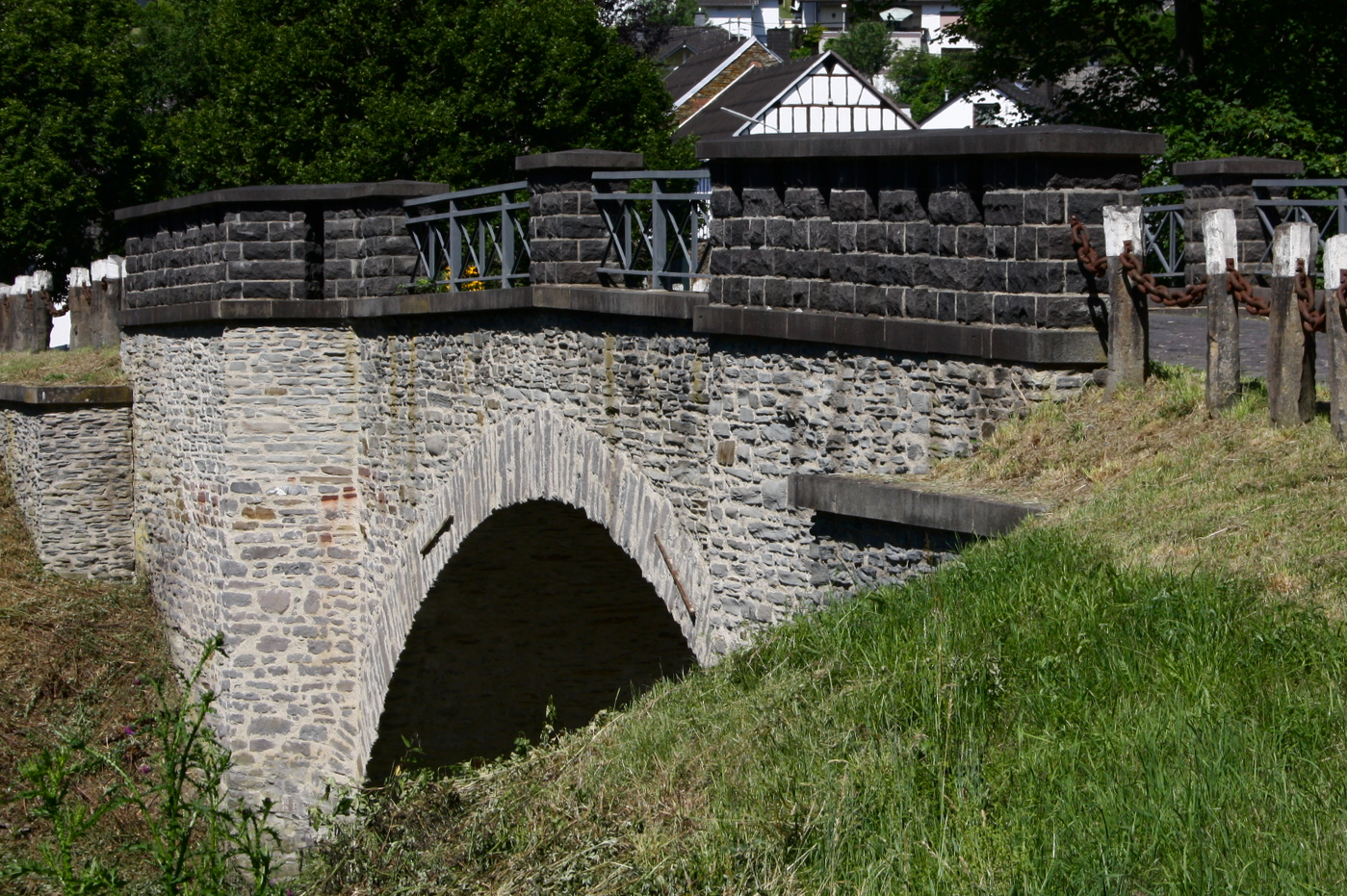 Brücke über den Gelbach, Ettersdorf, Ortsteil von Montabaur, Westerwald, Rheinland-Pfalz, Deutschland